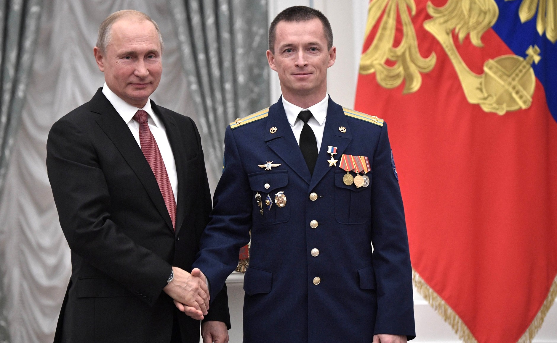 Звание Героя Российской Федерации и почётное звание «Лётчик-космонавт Российской Федерации» присвоено космонавту-испытателю Сергею Рыжикову.